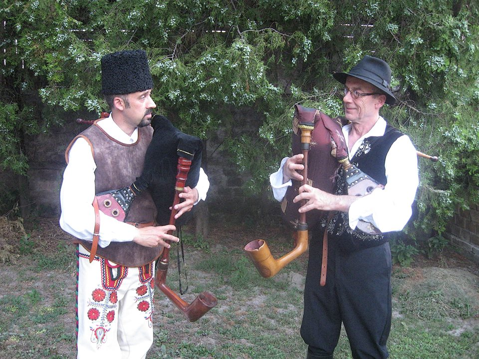 Na slici su vojvođanski gajdaši Maksim Mudrinić i Vanja Ilijev. U Sivcu i Kikindi, 23. i 24. jula obavljeno je snimanje vojvođanskih gajdaša Maksima Mudrinića, Vanje Ilijeva, Branislava Zarića i „Bećaruša”, Milana Vašalića (koji je prevashodno diplar), Ognjena Ognjanovića, Milorada Dobrosavljeva i Igora Popova. Snimanju se priključio i gajdaš iz Bugarske Božidar Simeonov.